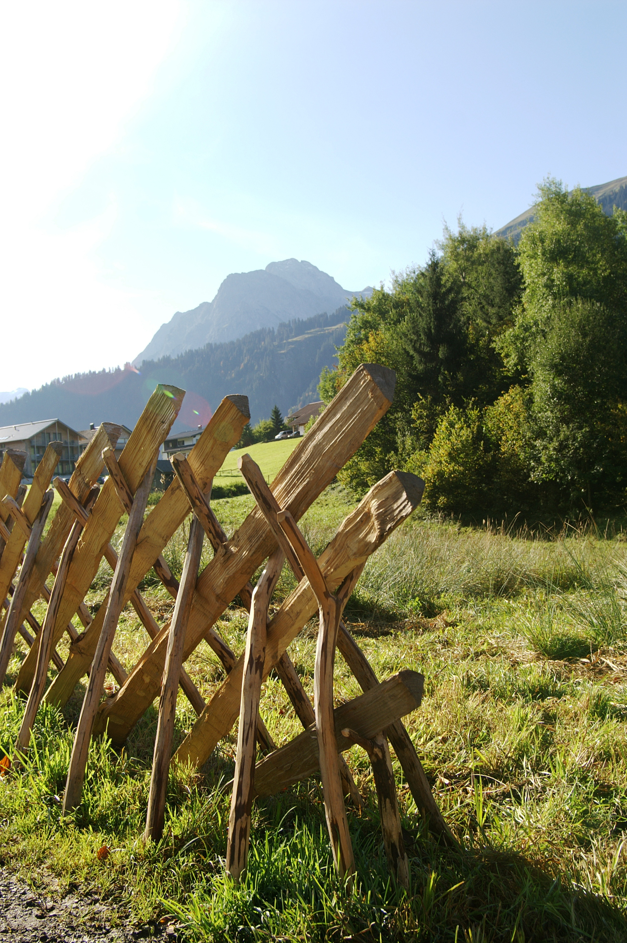 Schrankzaun auf dem Holdamoos in Schoppernau